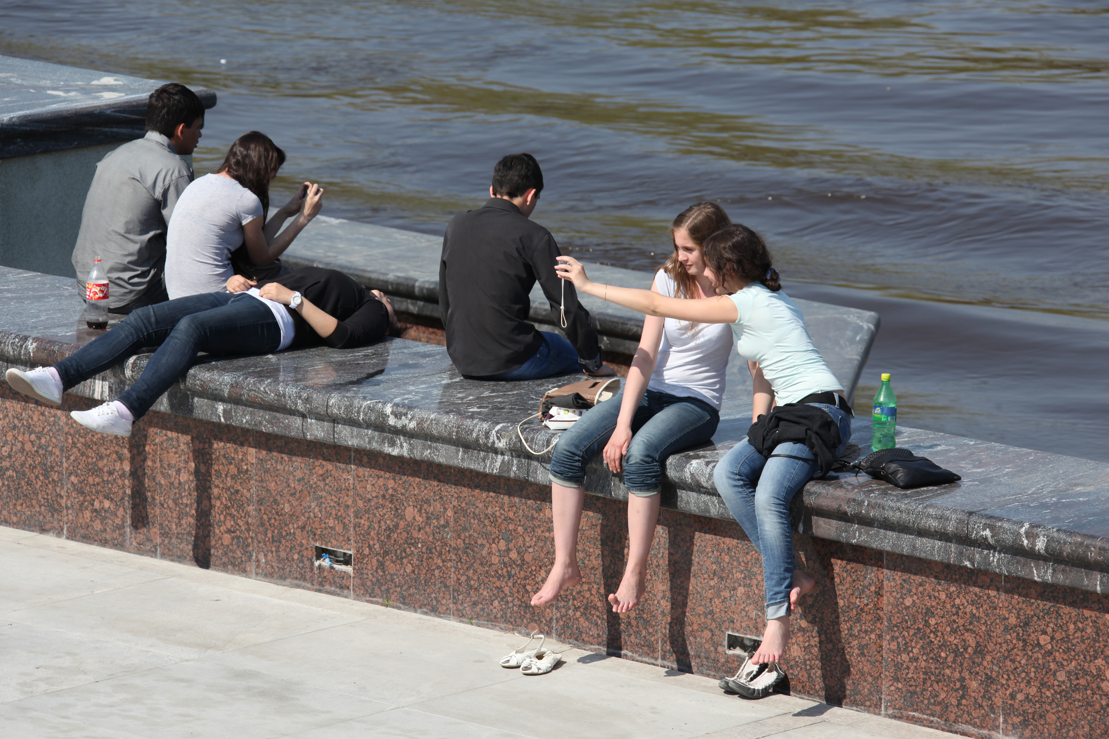 Infanoj sur kajo de rivero Turo. Tjumeno, Rusio.